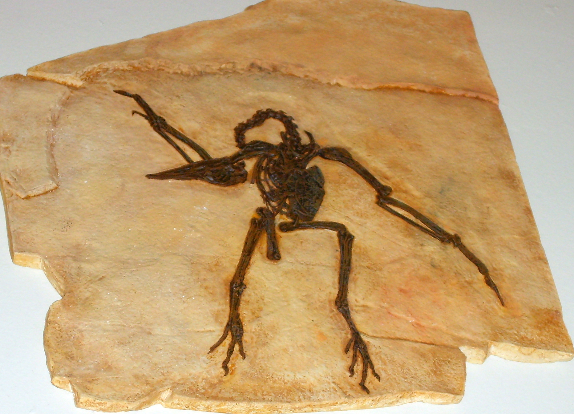 Pseudocrypturus cercanaxius fossil cast, Zoologisk Museum, Copenhagen.